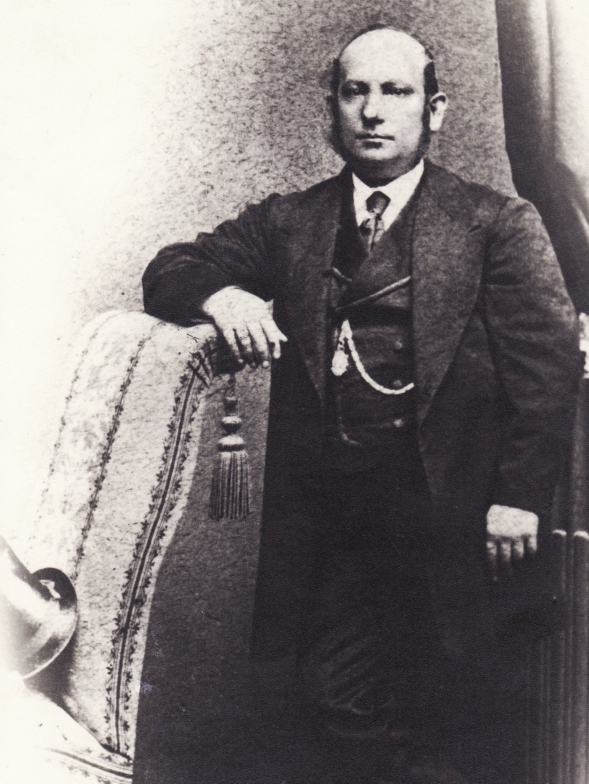 Don Pedro Gamboni Vera: ingeniero quimico e industrial salitrero chileno.